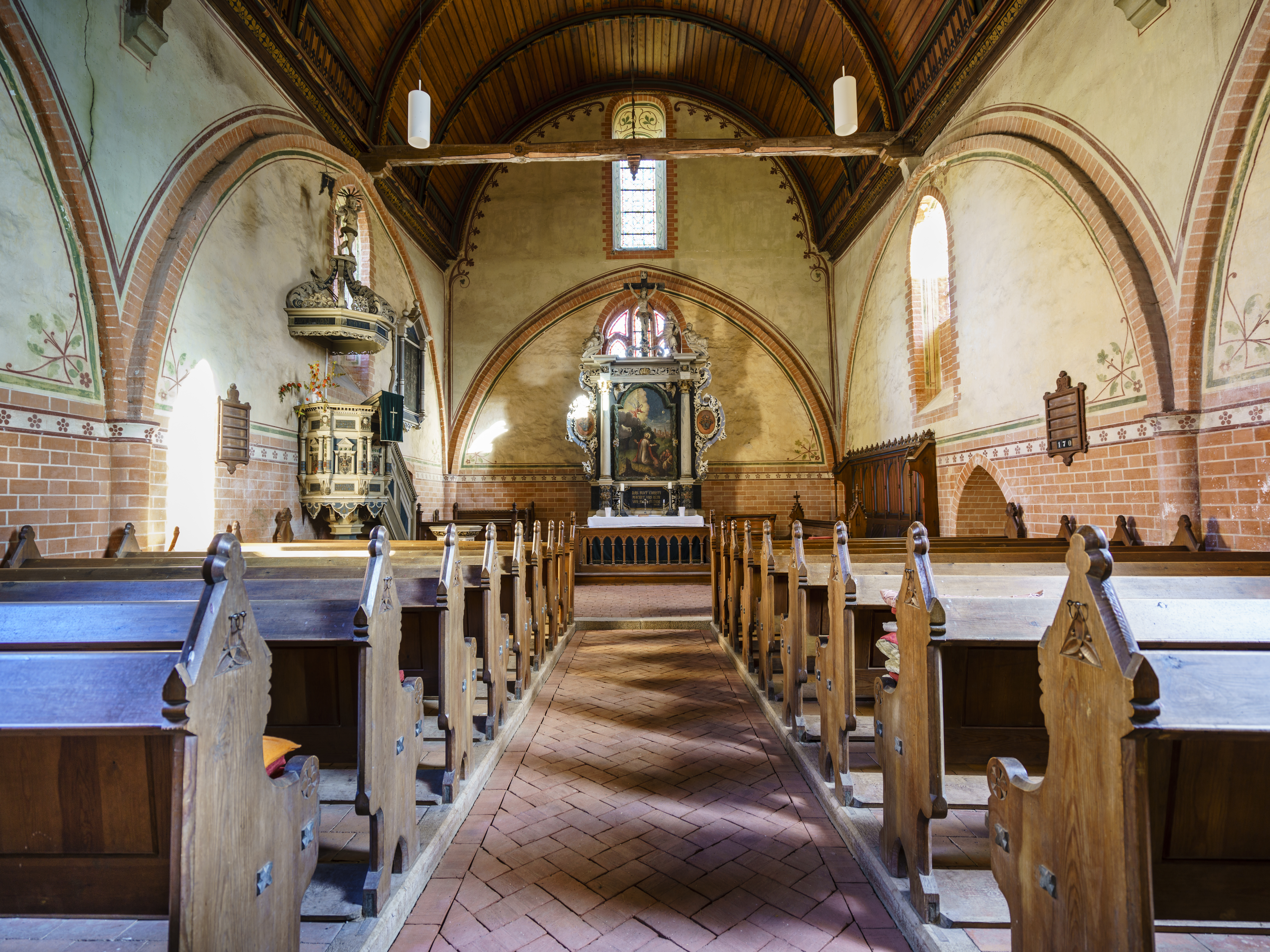 Dorfkirche Moisall - Schiff in Blickrichtung West